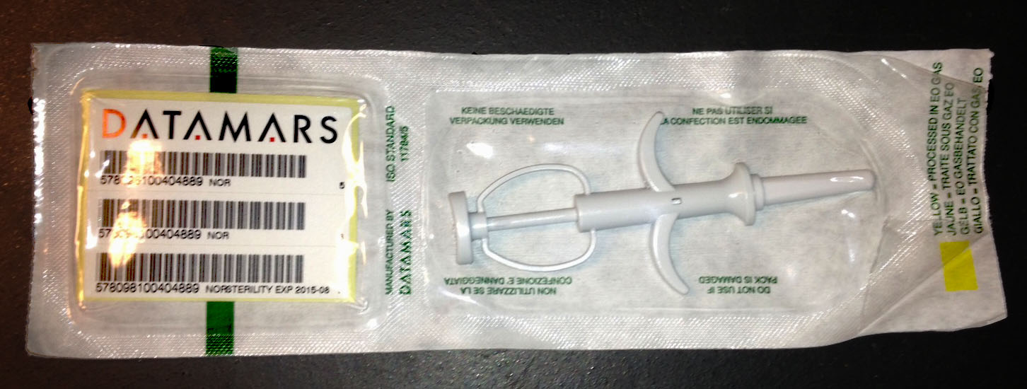 RFID chip for merking av dyr